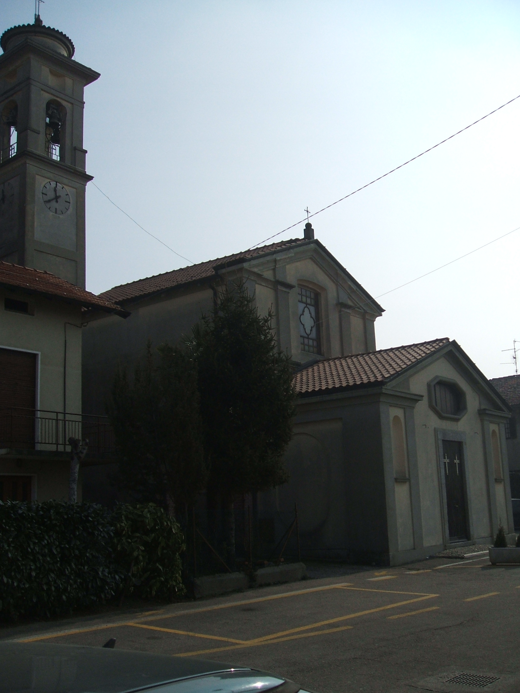 Chiesa di San Carlo-Rovera (Malnate, IT-VA)